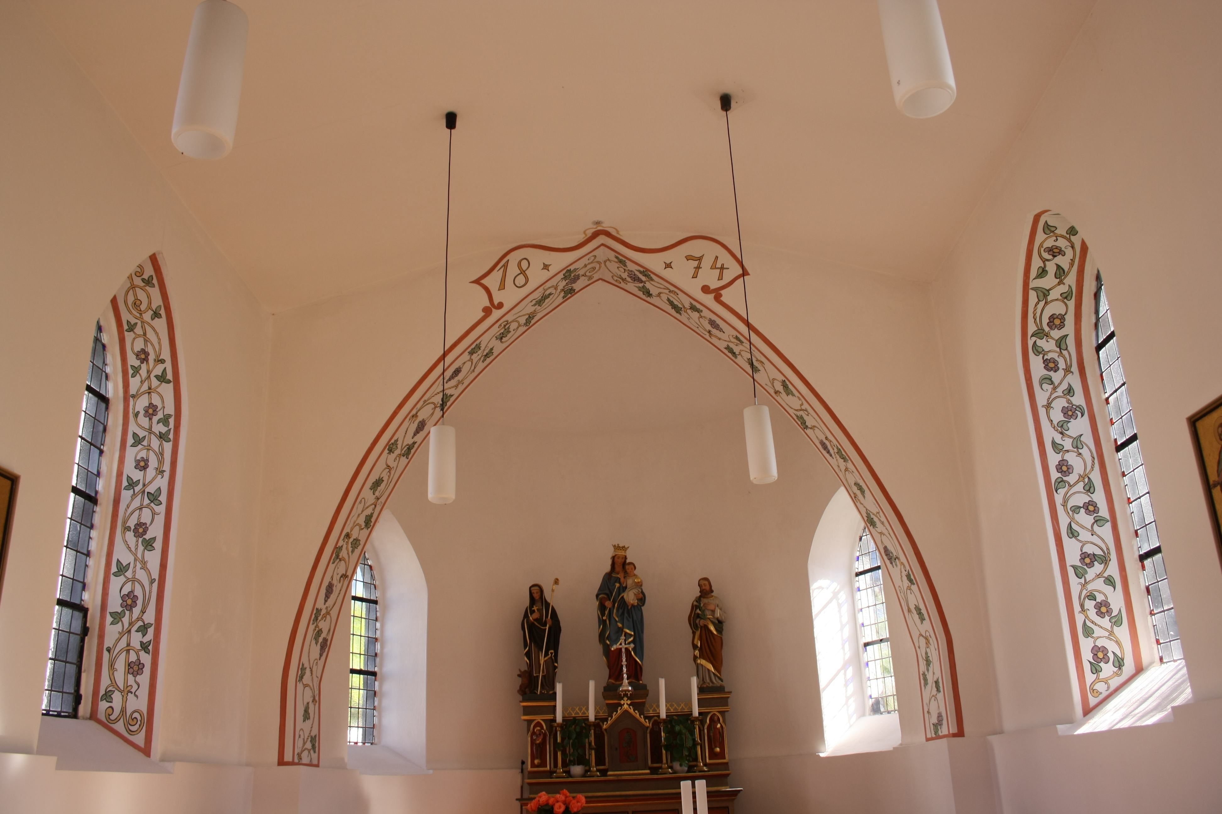 katholische Filialkirche St. Josef in Fuchshofen, Innenraum